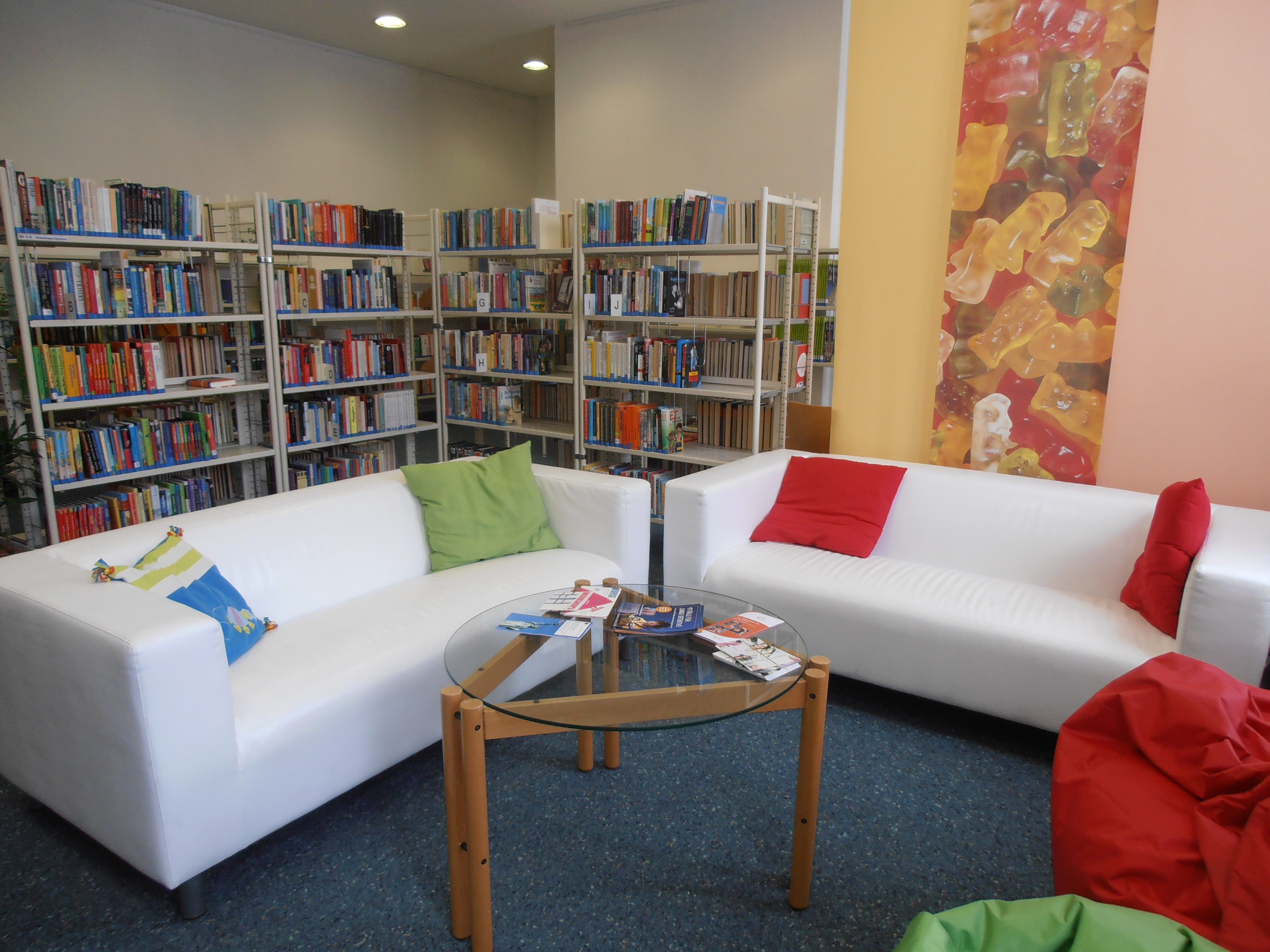 Jugendbuchbereich mit Leseecke